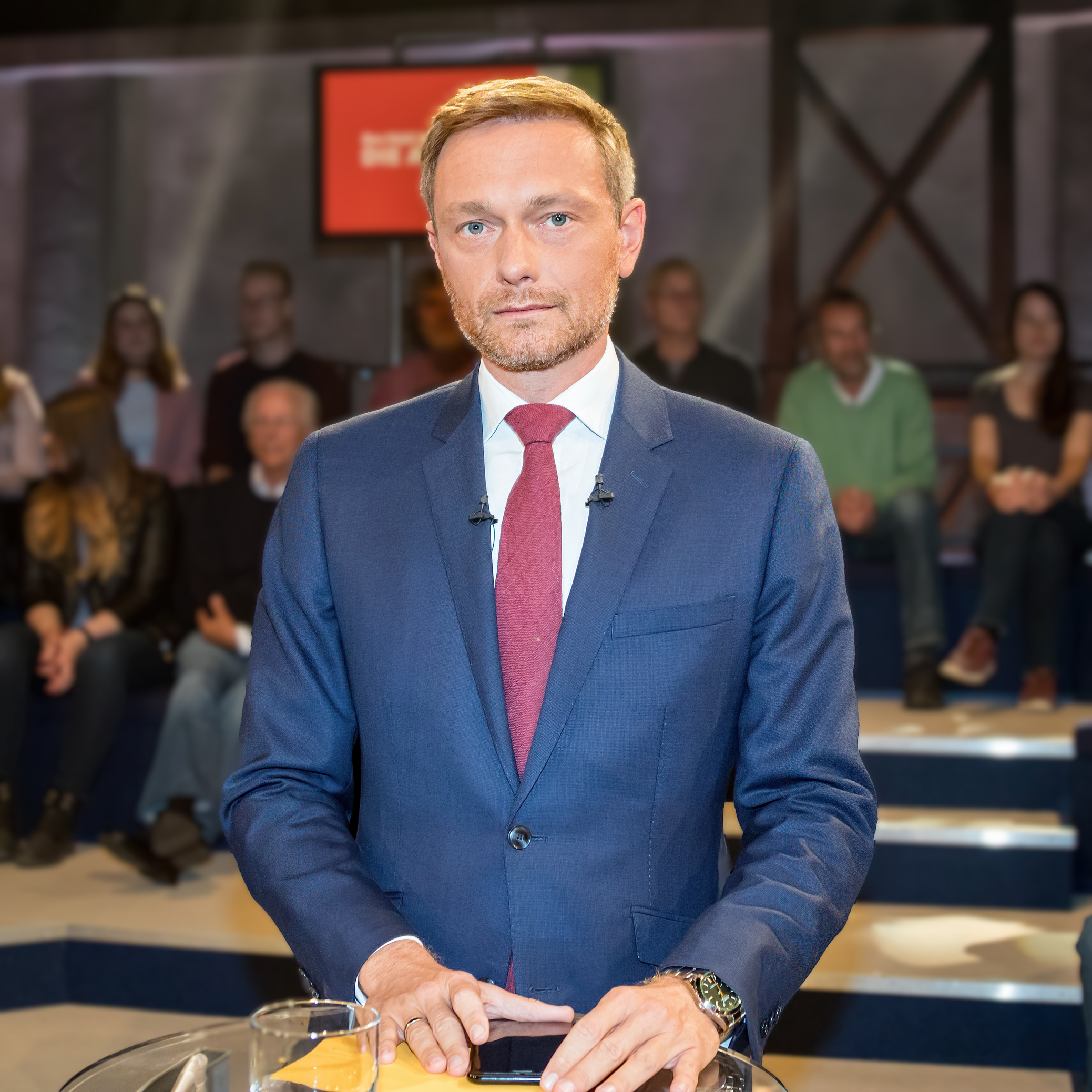 WDR-Sendung Wahl-Arena, Donnerstag, 4. Mai 2017 zur NRW-Wahl: Christian Lindner